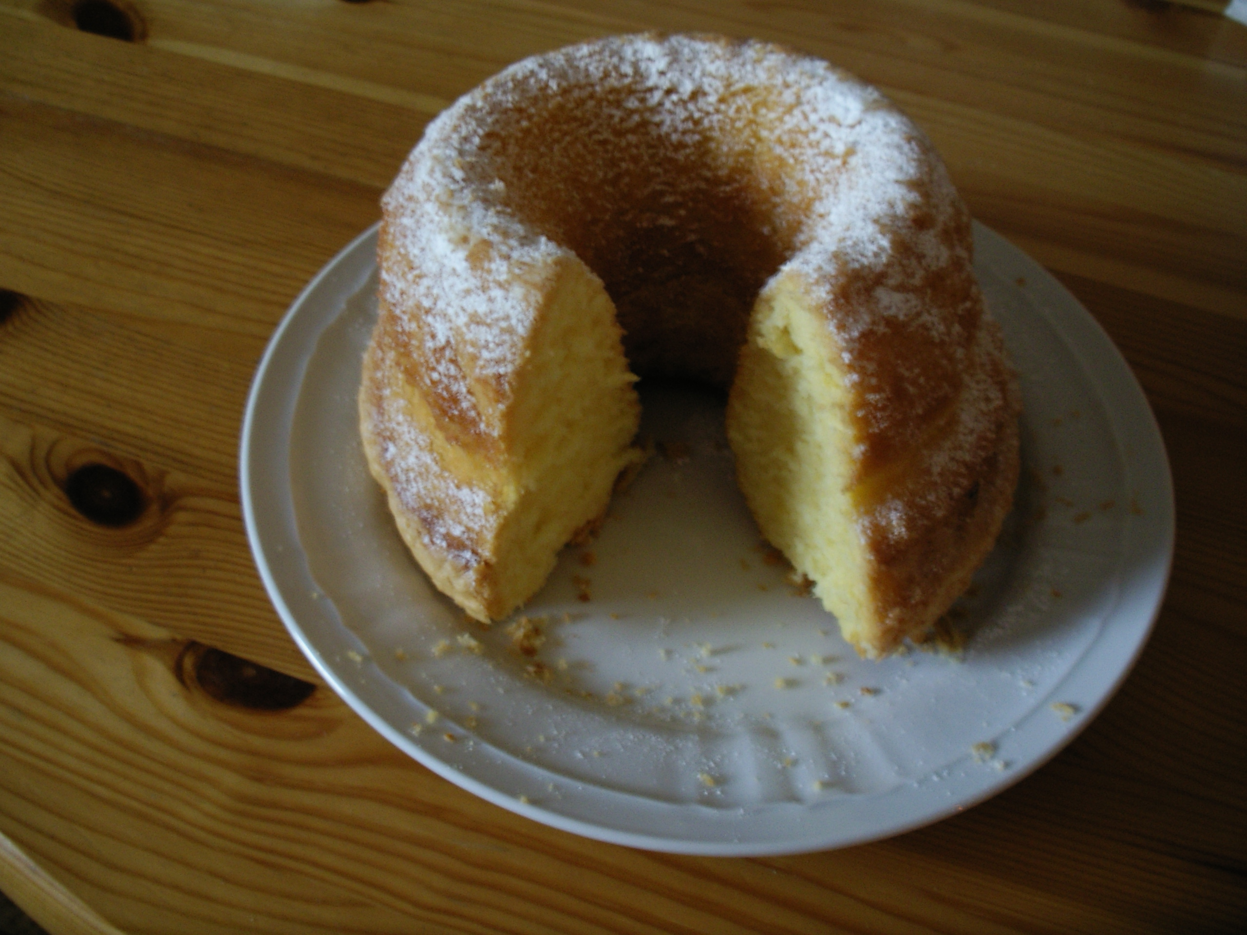 Beschreibung : Gugelhupf - aufgeschnitten. Quelle : Selbst fotografiert, Januar 2006